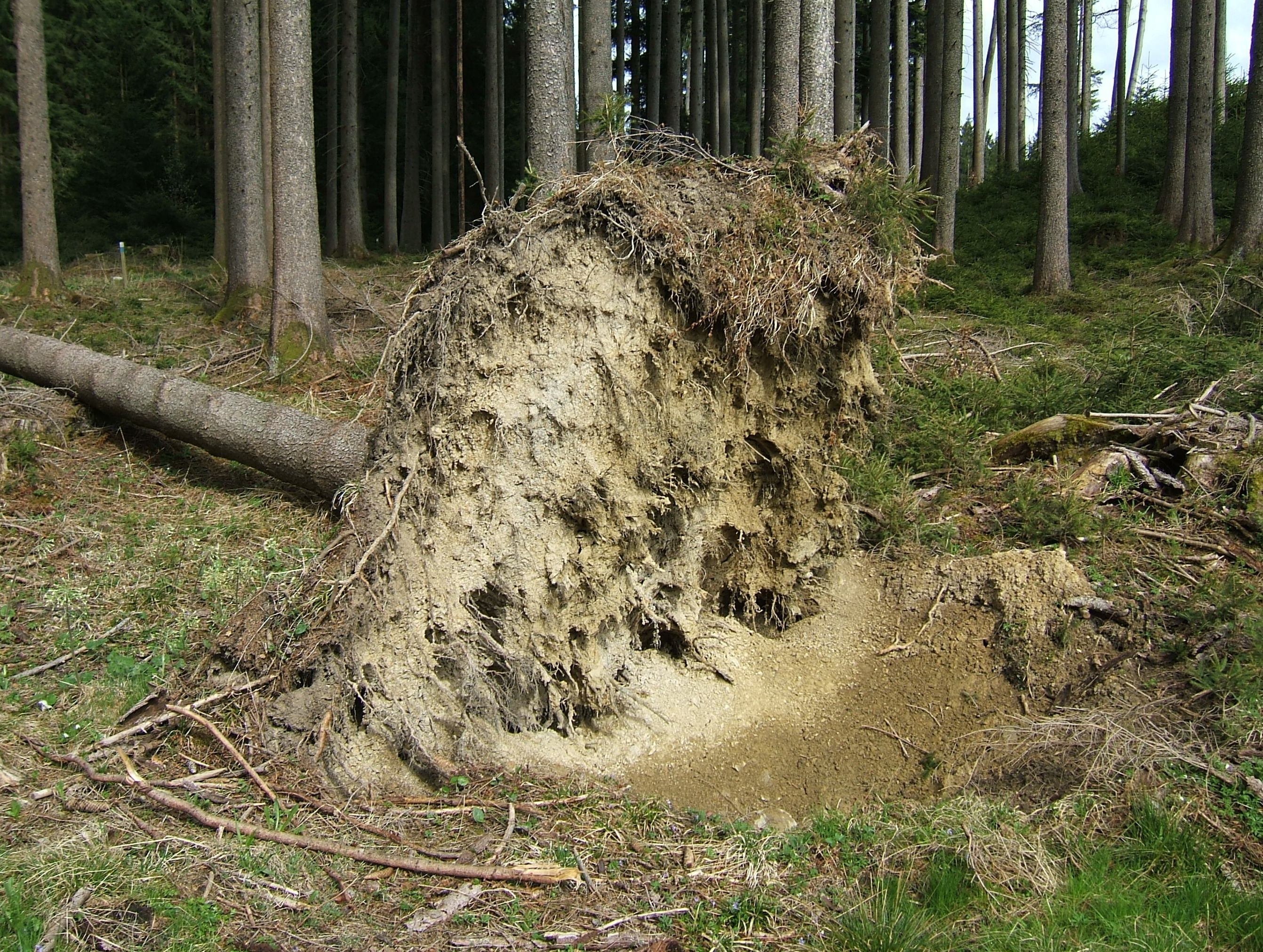 Vom Wind geworfene Fichte, Oberdorfer Wald, Landkreis Oberallgäu